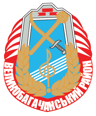 Герб Великобагачанського району